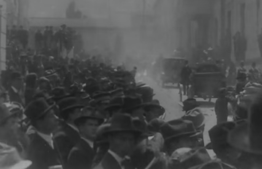 Fotograma de la muerte de Rafael Uribe Uirbe